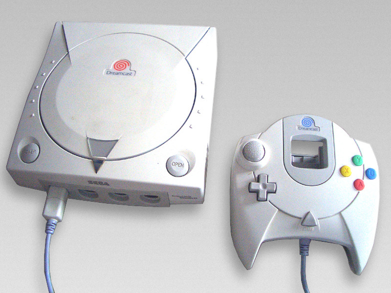 Japanische Dreamcast-Konsole und europäischer Dreamcast-Controller. Fotografiert und unter der GNU FDL veröffentlicht von Mode7. 14:06, 16. Feb 2005 Mode7 800 x 600 (283049 Byte) (Japanische Dreamcast-Konsole und europäischer Dreamcast-Controller)